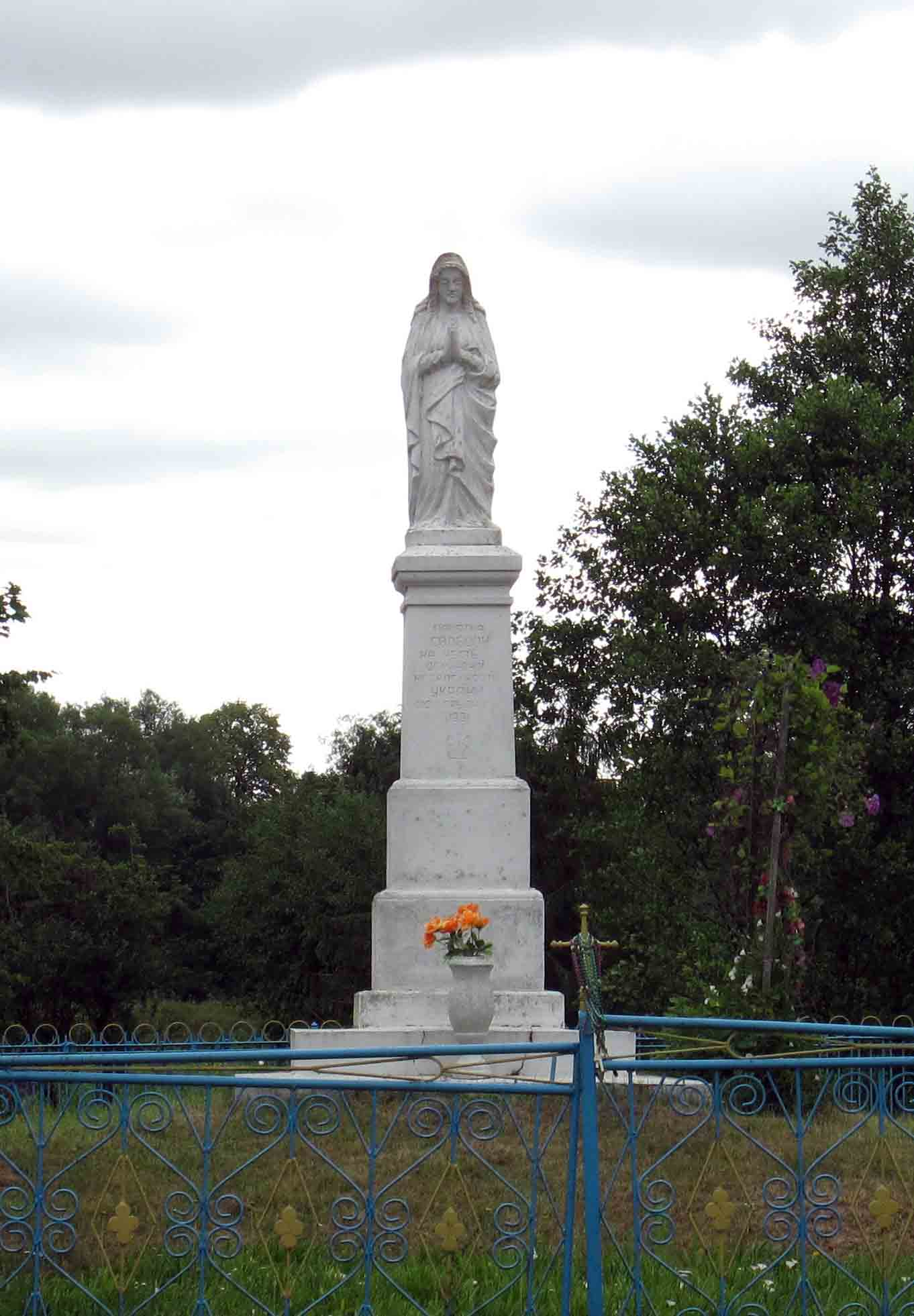 Фігура на честь проголошення Незалежності України в Мильному Зборівського району Тернопільської області